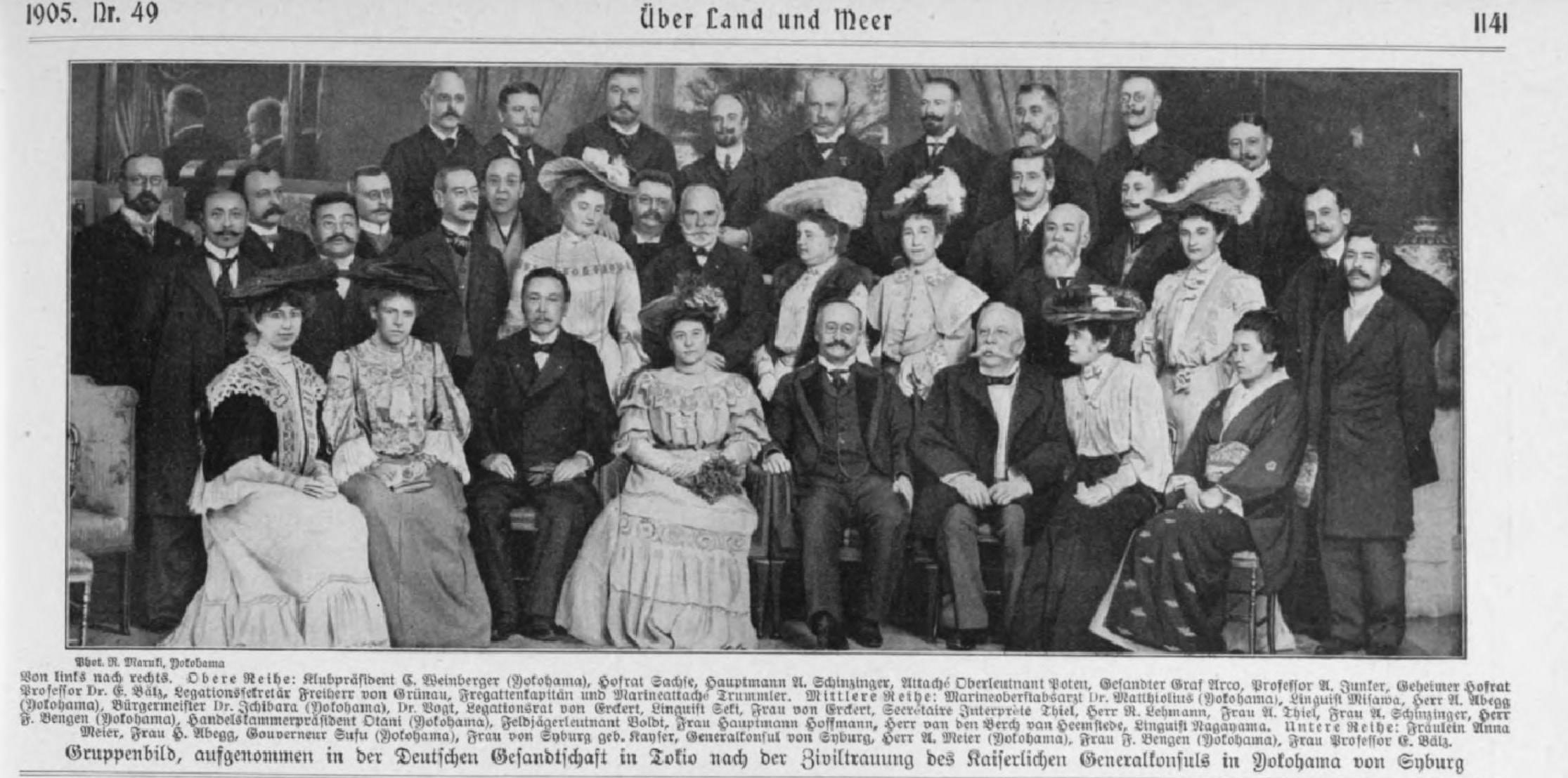 Hochzeitsphoto des Konsuls Friedrich Wilhelm Karl von Syburg (1854-1934) und Ida Marie Kayser (1863-1947) mit der deutschen Gesandtschaft in Yokohama Obere Reihe: Klubpräsident Weinberger (Yokohama), Hofrat Sachse, Hauptmann Schinziger, Attache Oberleutnant Poten, Gesandter Graf Arco, Professor Junker, Geheimer Hofrat Bälz, Legationssekretär Freiherr von Grünau, Fregattenkapitän und Marieattache Trümmler Mittlere Reihe: Marineoberstabsarzt Matthiolius (Yokohama), Linguist Misakawa, Herr Abegg (Yokohama), Bürgermeister Ichibara (Yokohama), Dr. Vogt, Legattionsrat von Erckert, Linguist Seki, Frau von Erckert, Secretair Interprete Thiel, Herr Lehmann, Frau Thiel, Frau Schinziger, Herr Bengen (Yokohama), Handelskammer Präsident Otani (Yokohama), Feldjägerleutnant Boldt, Frau Hauptmann Hoffmann, Herr van dem Berch vam Heemstede, Linguist Nagajama, Untere Reihe:Fräulein Anna Meier, Frau Abegg, Gouverneur Susu (Yokohama), Frau von Syburg gen. Kayser, Generalkonsul von Syburg, Herr Meier (Yokohama), Frau Bengen (Yokohama), Frau Professor Bälz Werner Ernst Otto von Grünau, (* 9. Oktober 1874; † 20. August 1956) Erwin Otto Eduard Bälz (auch Erwin Baelz), ab 1905 von Baelz (* 13. Januar 1849; † 31. August 1913) (vermutlich) Hans Abegg (1856–1916), Frau Elsa Clara Voigt (* 25.08.1875; † 20.11.1943) [1] (vermutlich) Karl Friedrich von Erckert (1869–1923), [2]